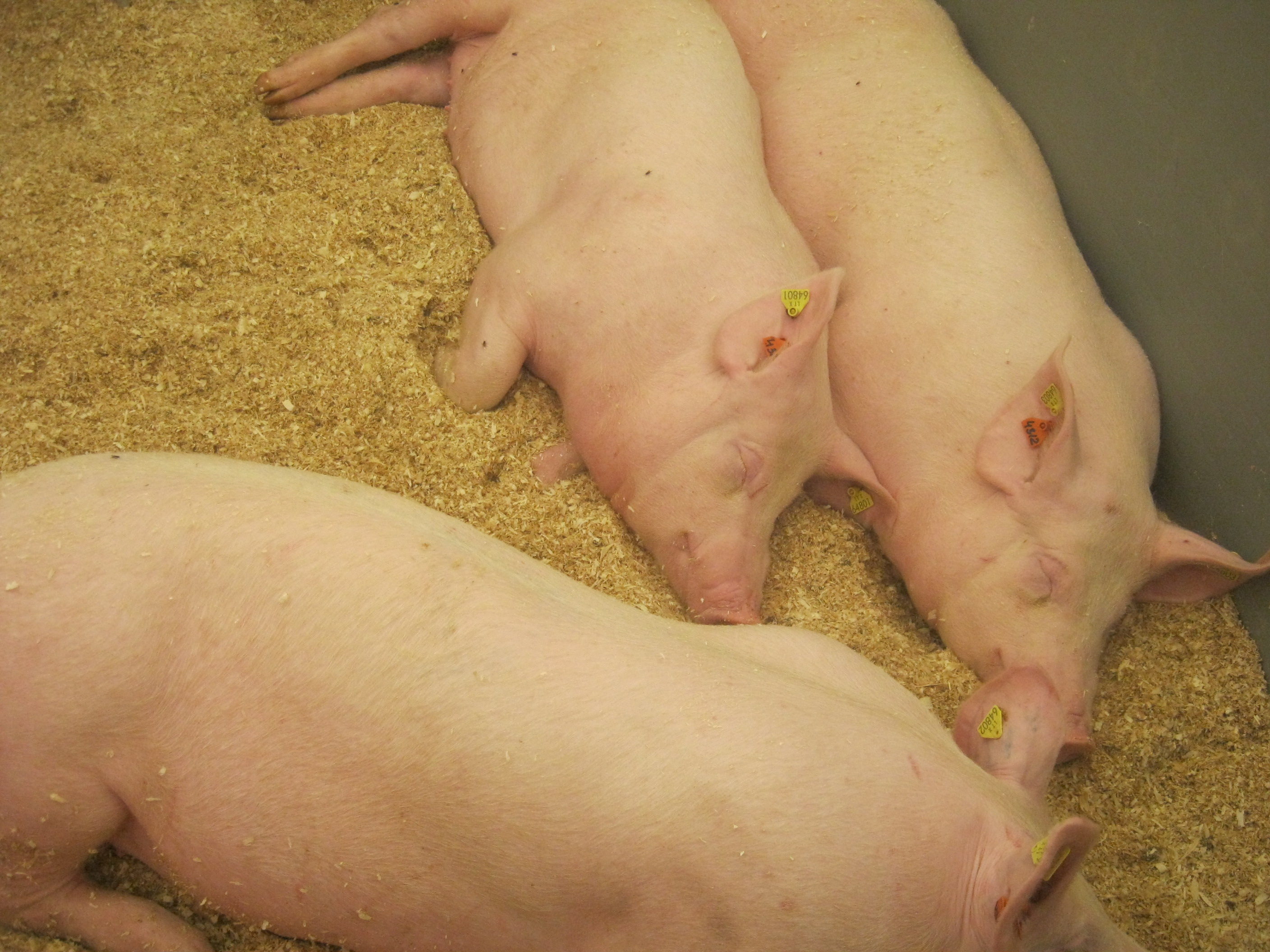 AgroBalt 2012